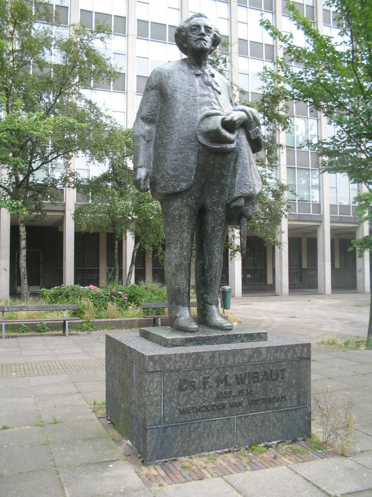 statue mr Wibaut (Amsterdam, Netherlands), july 2005